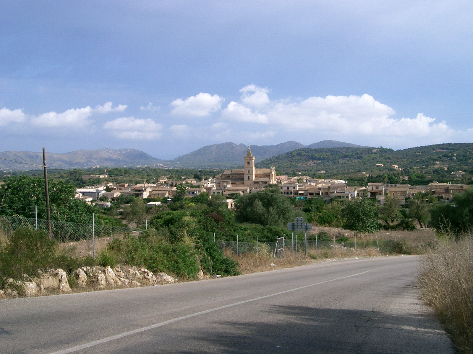 Son Carrió, a Mallorca des de la carretera que duu a Portocristo.